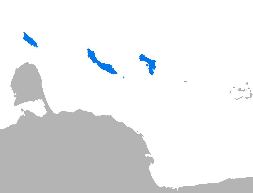 Idioma papiamento